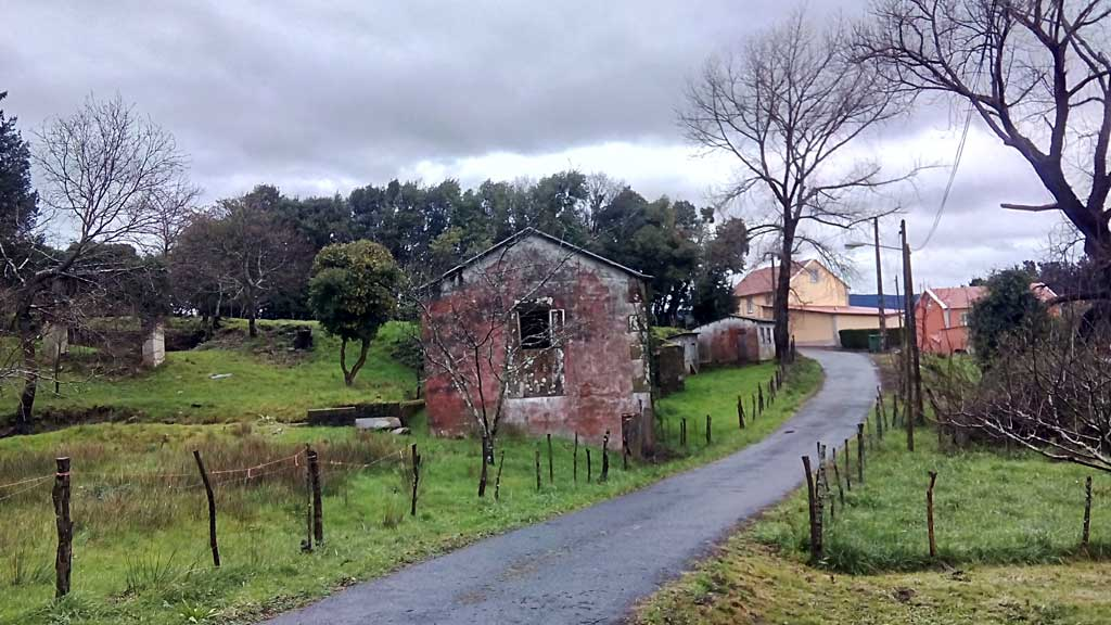 Vista de Pradelo, Pedroso, Narón.